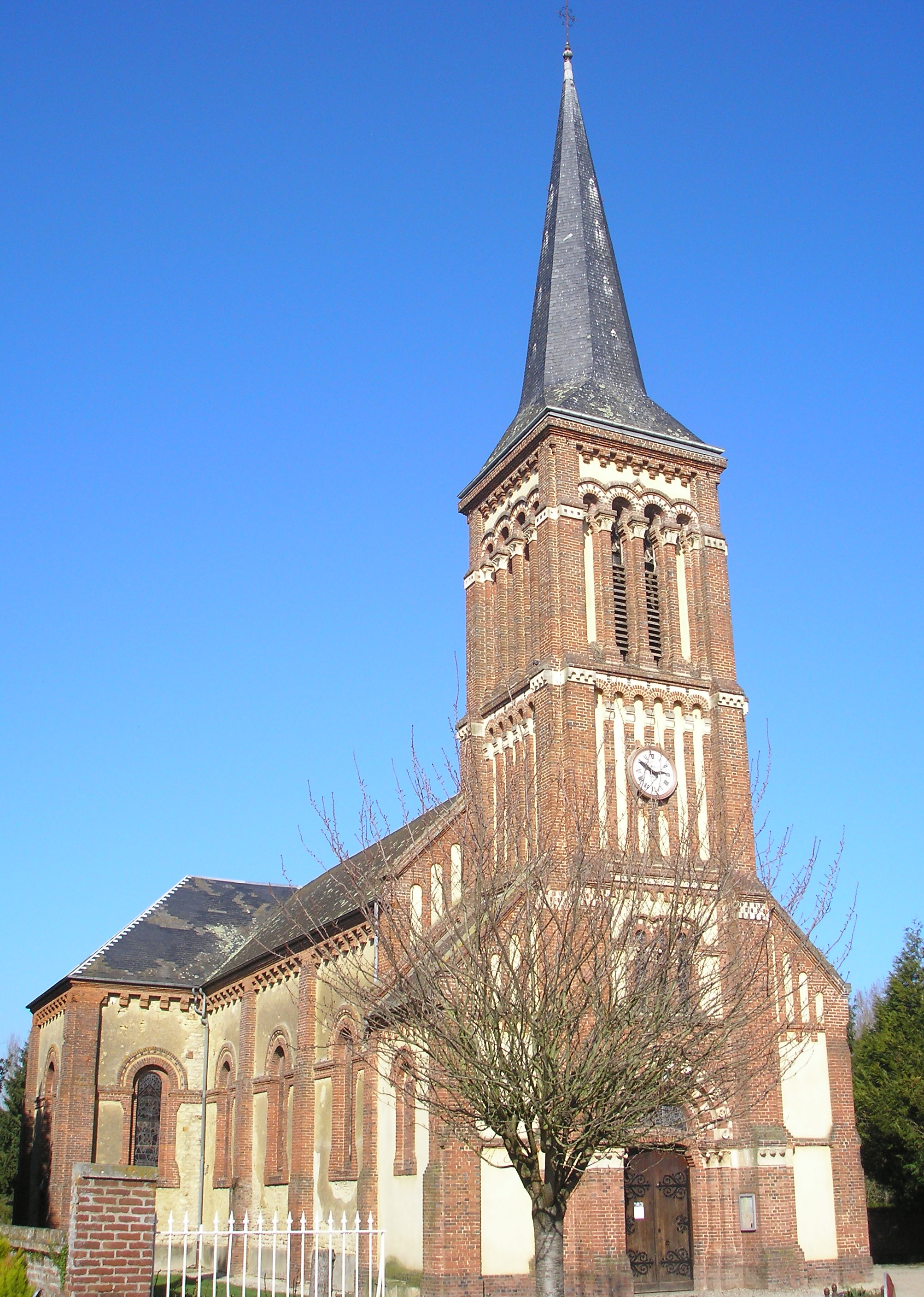 Saint-Julien-le-Faucon (Normandie, France). L'église Saint-Julien.